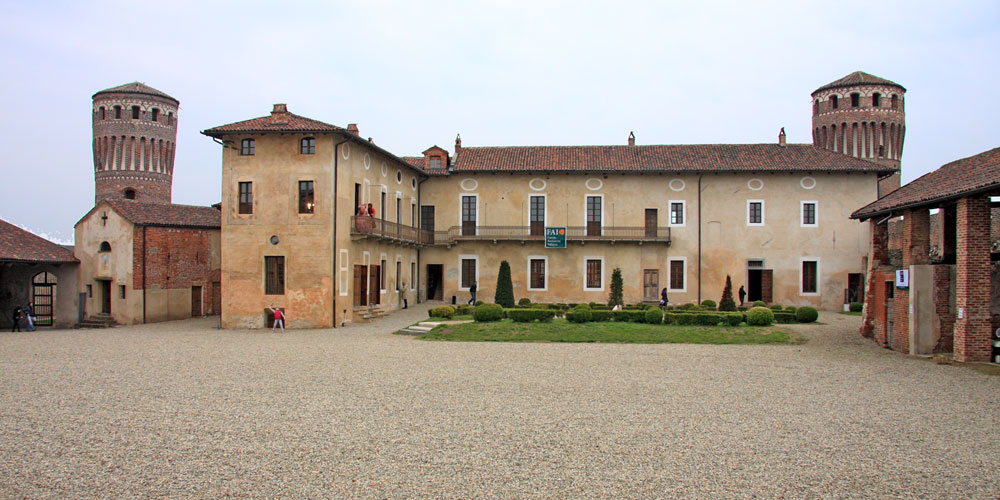 Castello di Quinto Vercellese, vista dal cortile interno